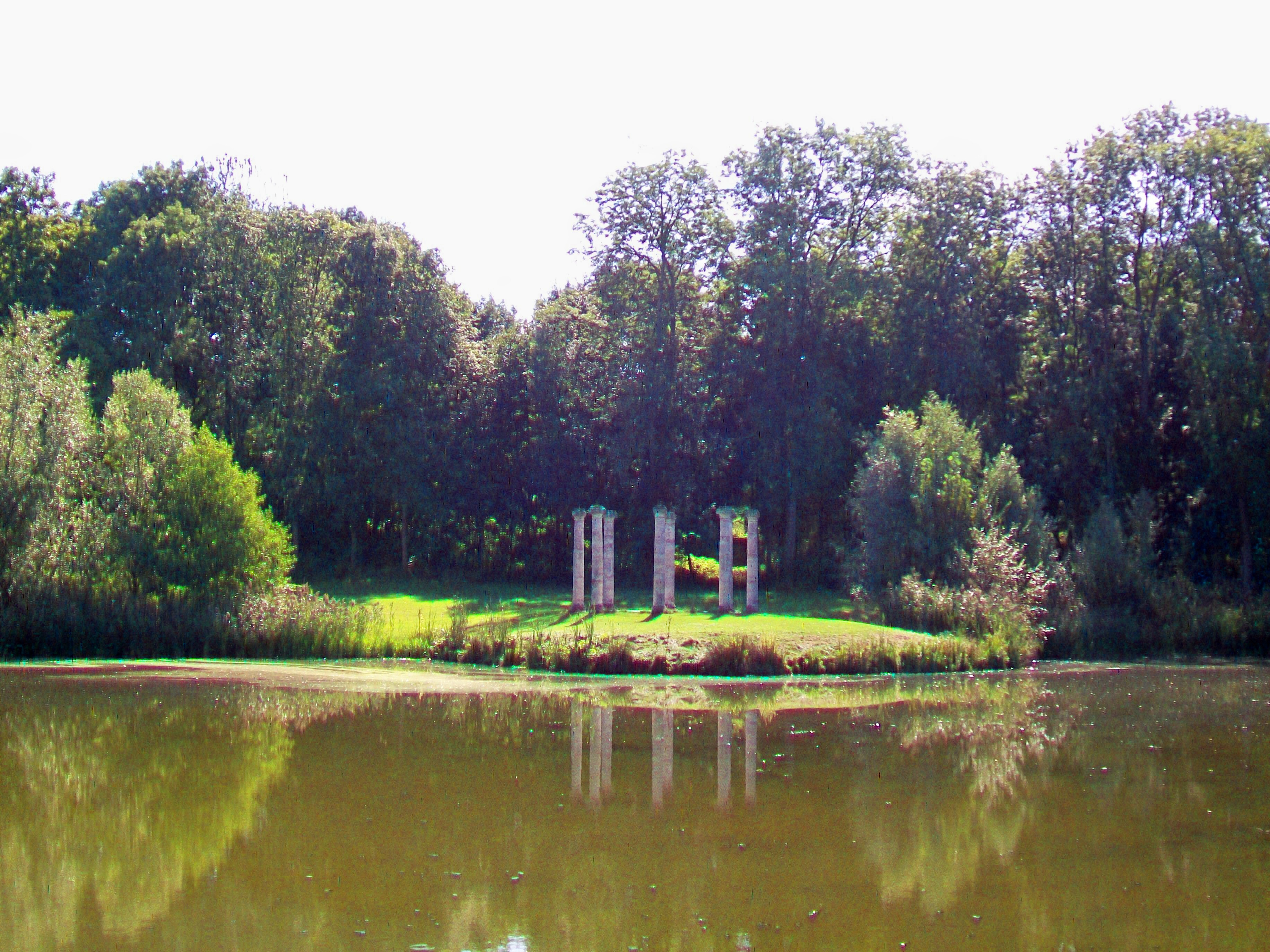 Fabrique de jardin au sud du lac : sept colonnes évoquant la ruine d'un temple antique.